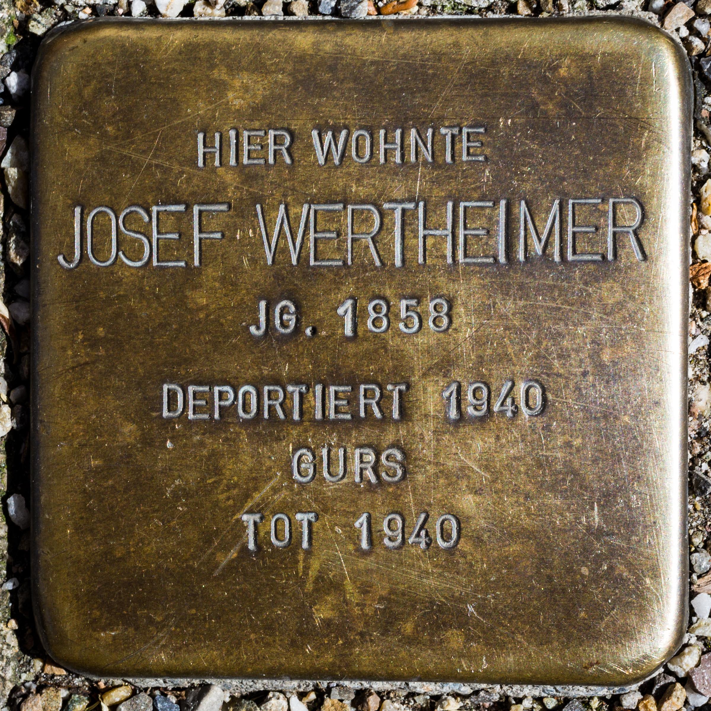 Stolperstein für Josef Wertheimer Schulstr. 23 Kehl